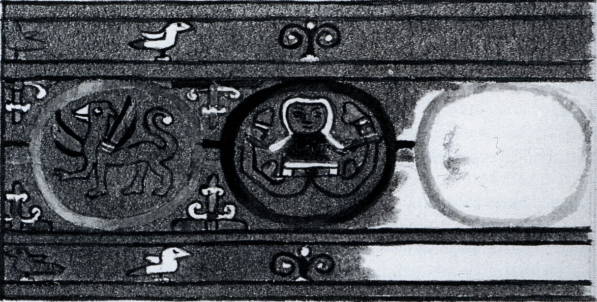 Zeichnung eines Teils der Webborte der Schuhe der Reichskleinodien